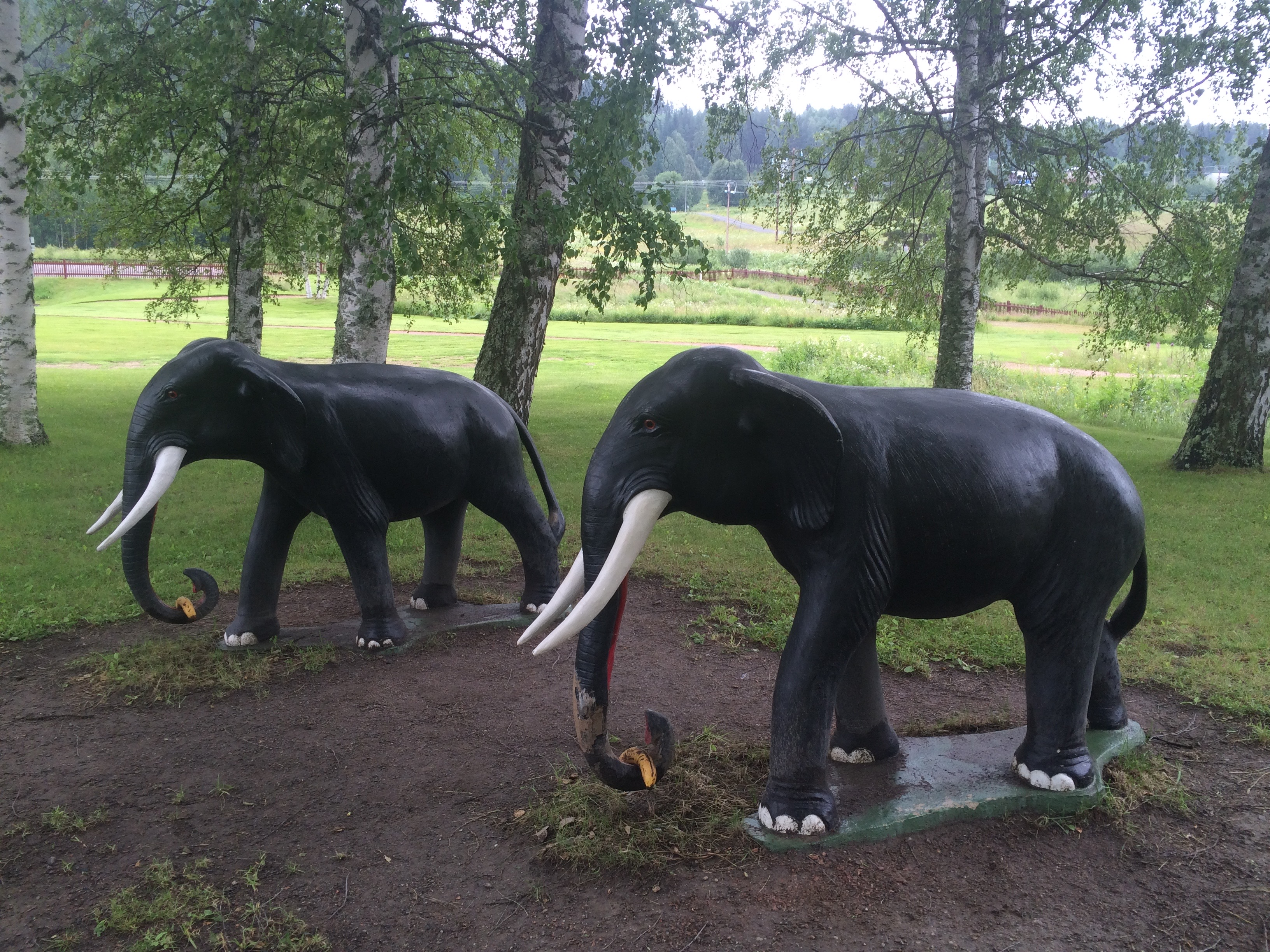 Skulpturer av elefanter ved Thailändska Paviljongen i Ragunda, Sverige. To levende elefanter, Bua og Sanoi, ble gitt til det svenske kongehuset av kong Bumibol i 2004. De ble plassert i Kolmårdens djurpark